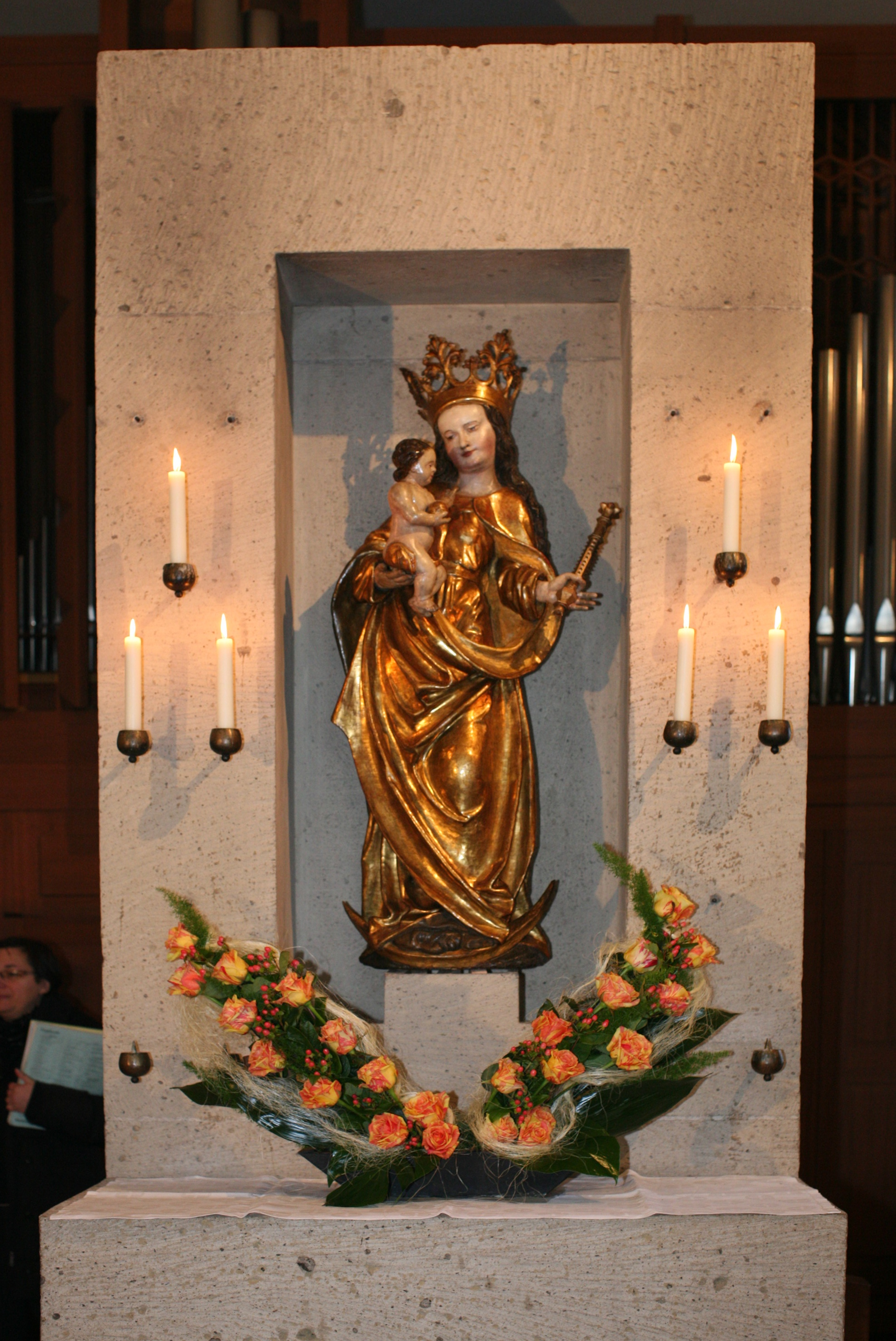 Spätgotische Marienfigur, Höhe 1,30 m, Herkunft unbekannt